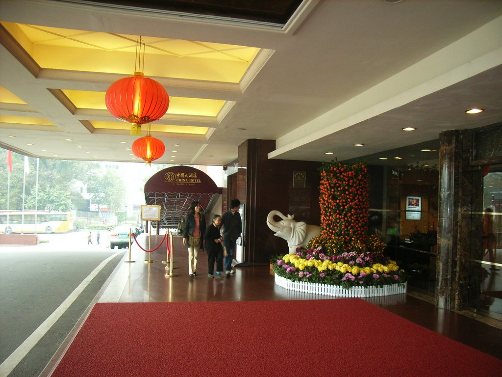 中國大酒店(廣州) CHINA HOTEL, GUANGZHOU, CHINA (by Zha Nai HO).